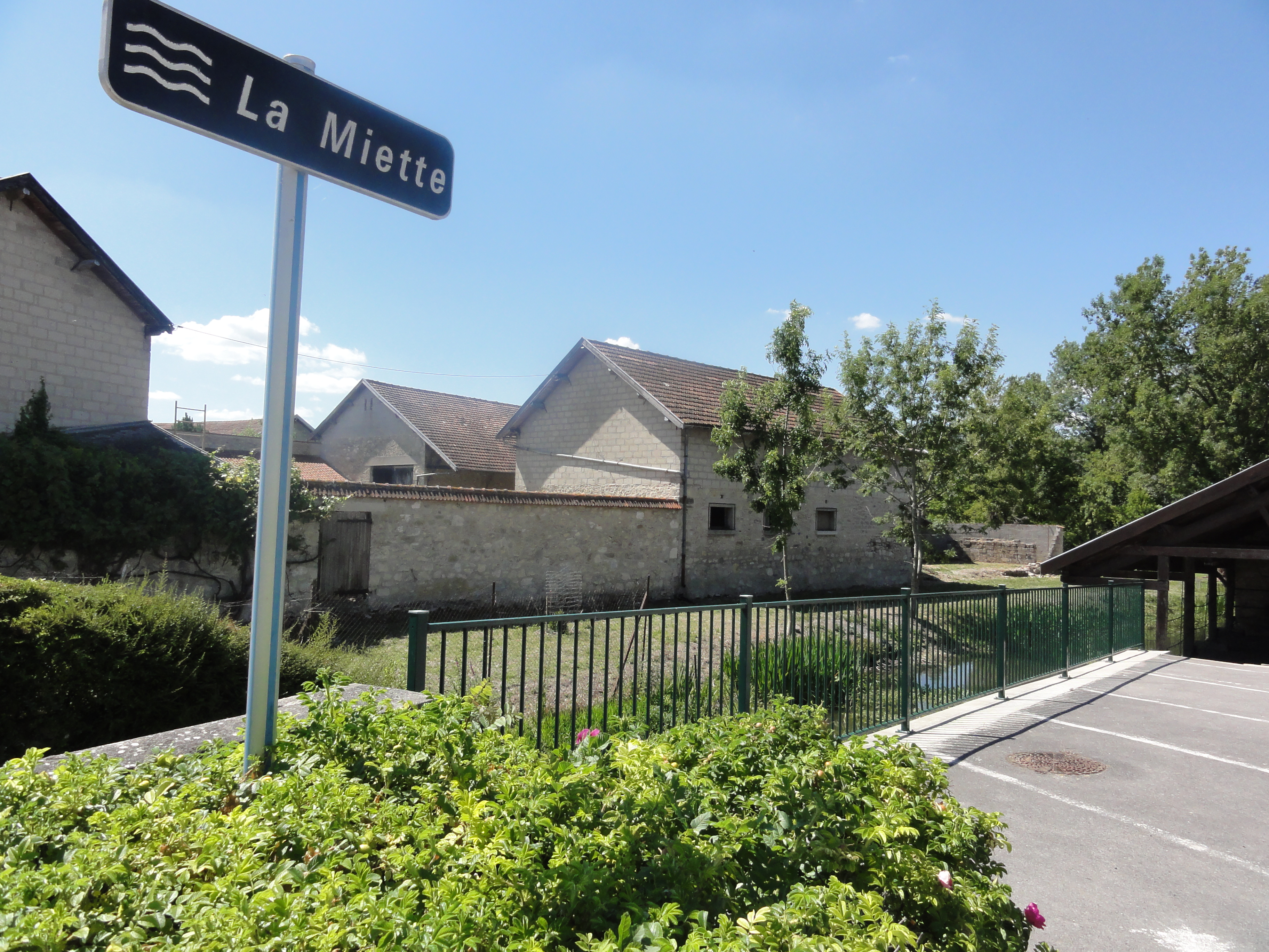 Juvincourt-et-Damary (Aisne) La Miette, panneau